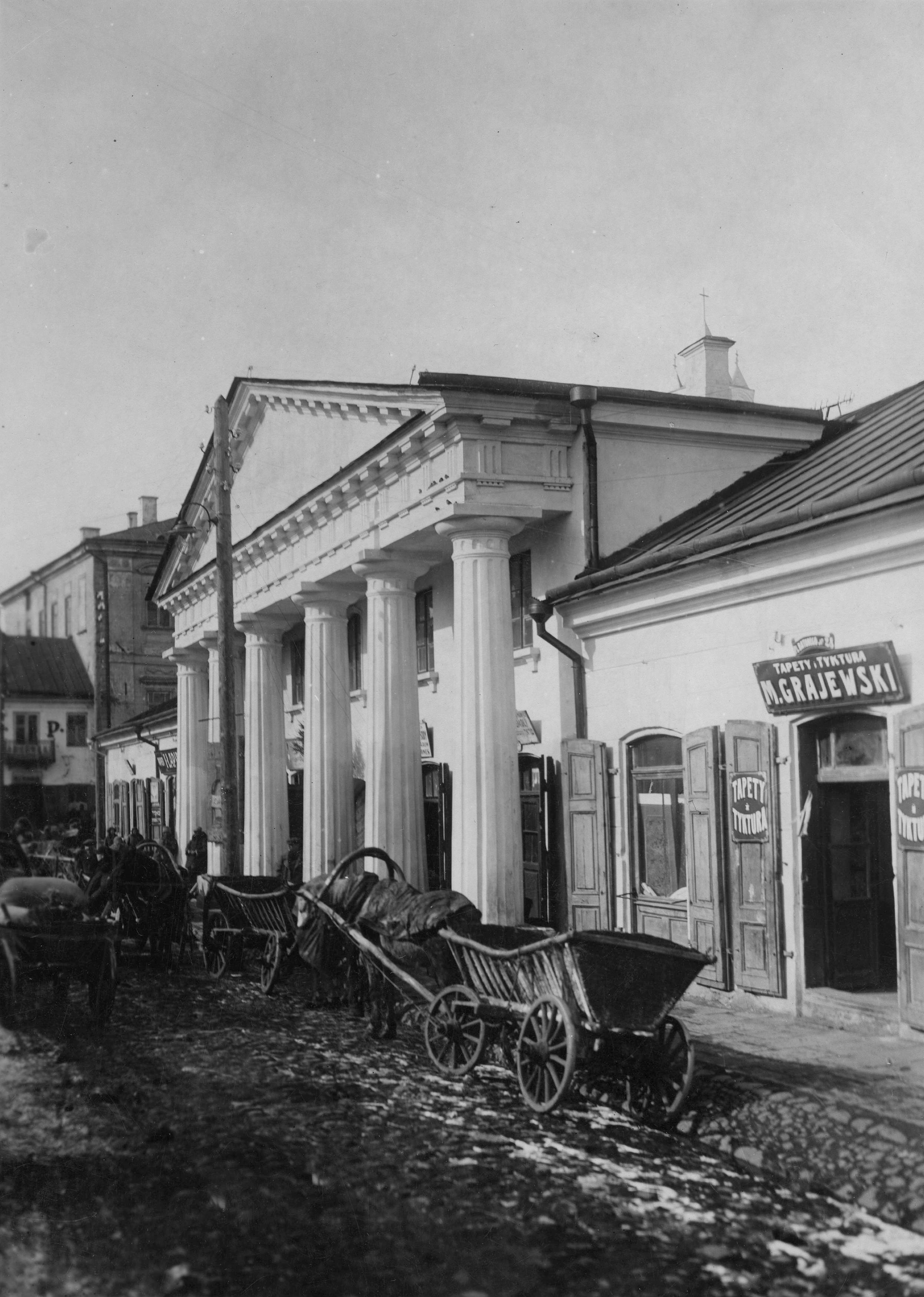 Беларуская (тарашкевіца): Горадня (Horadnia). Ратуша